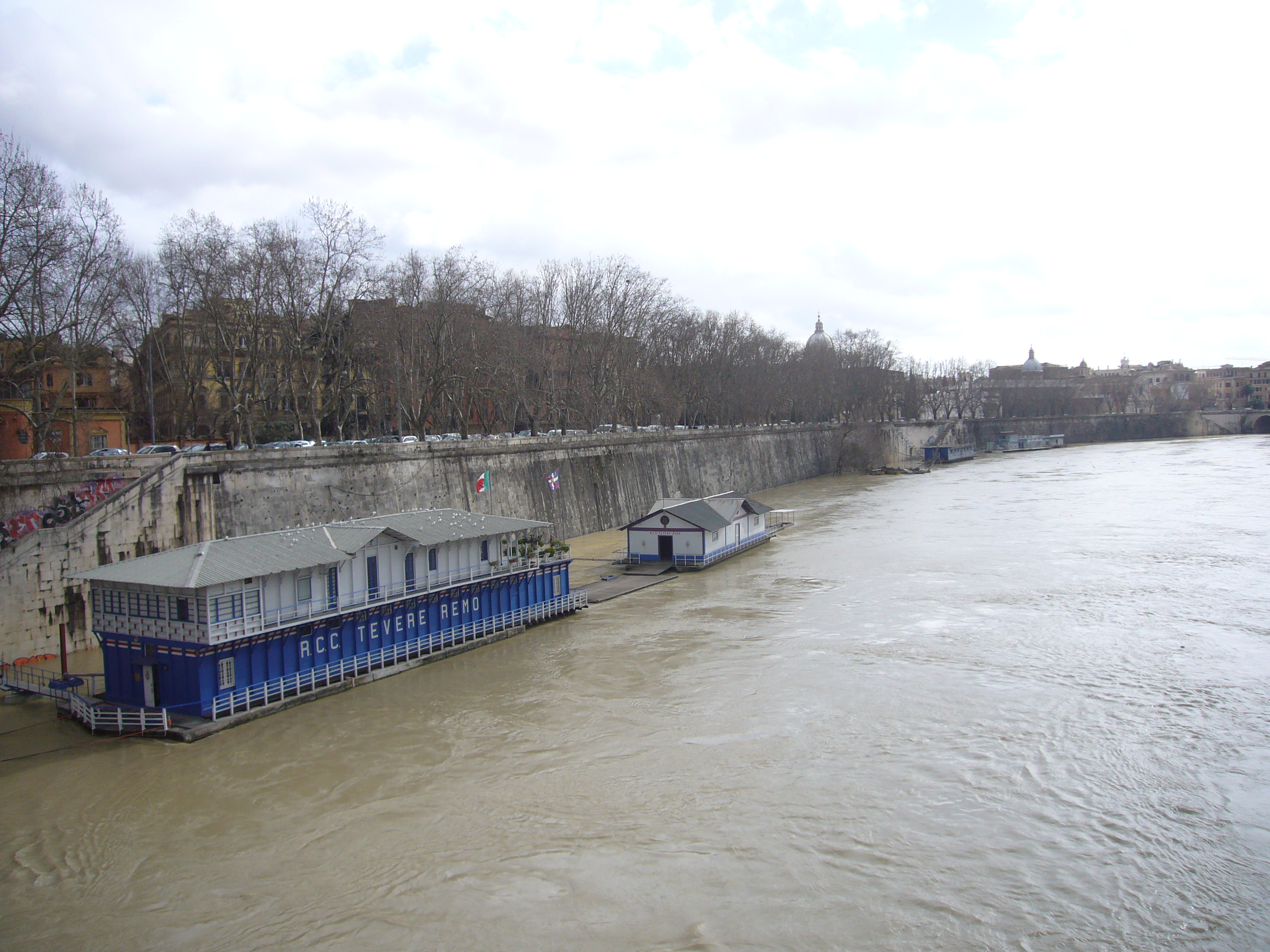 Roma, Lungotevere in Augusta: sede del "Reale Circolo Canottieri Tevere Remo"